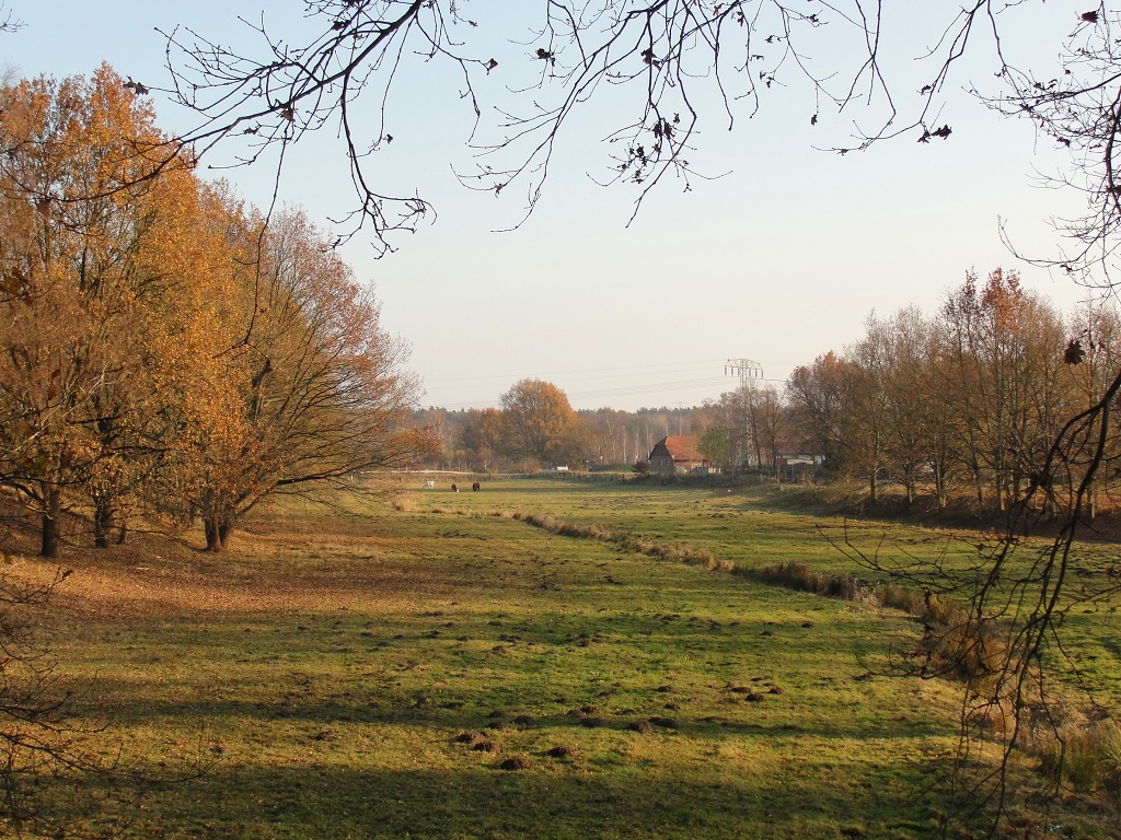 Das Perletal in Perleberg (Brandenburg) – der Verlauf des Baches „Perle“ zeichnet sich durch den schmalen Streifen höheren Bewuchses ab, der das Weideland durchzieht.